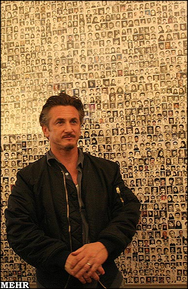 بازدید شان پن از موزهٔ سینما در تهران